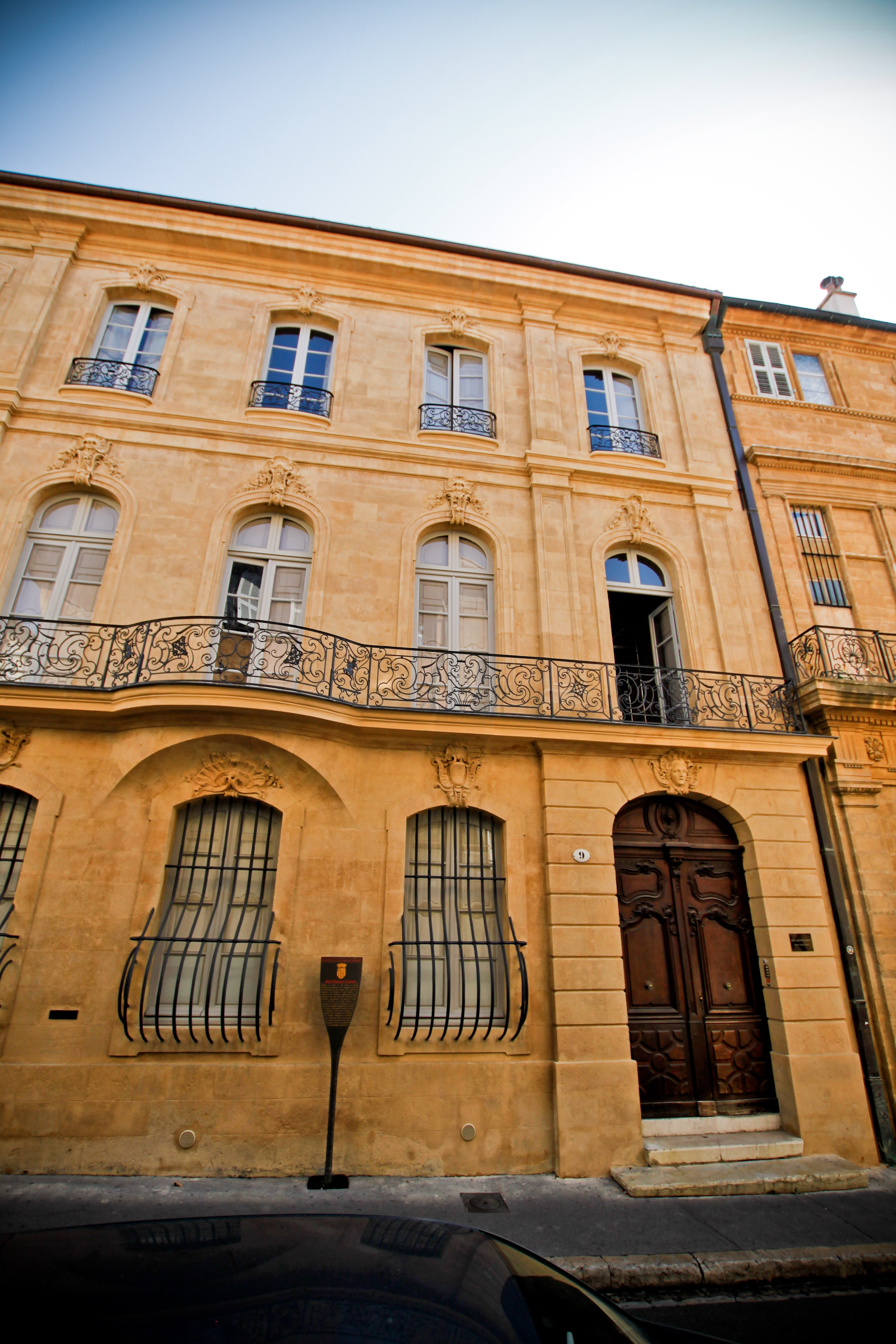 Hôtel Villeneuve d'Ansouis, 9 rue du Quatre-Septembre, quartier Mazarin, Aix-en-Provence (France). .